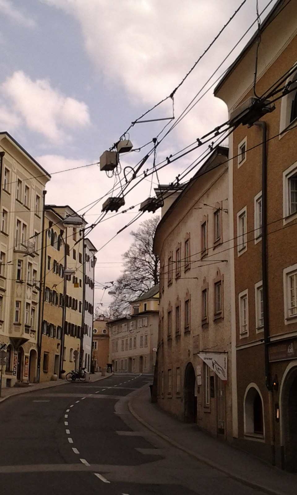 Müllner Hauptstraße, Stadtteil Mülln, Salzburg